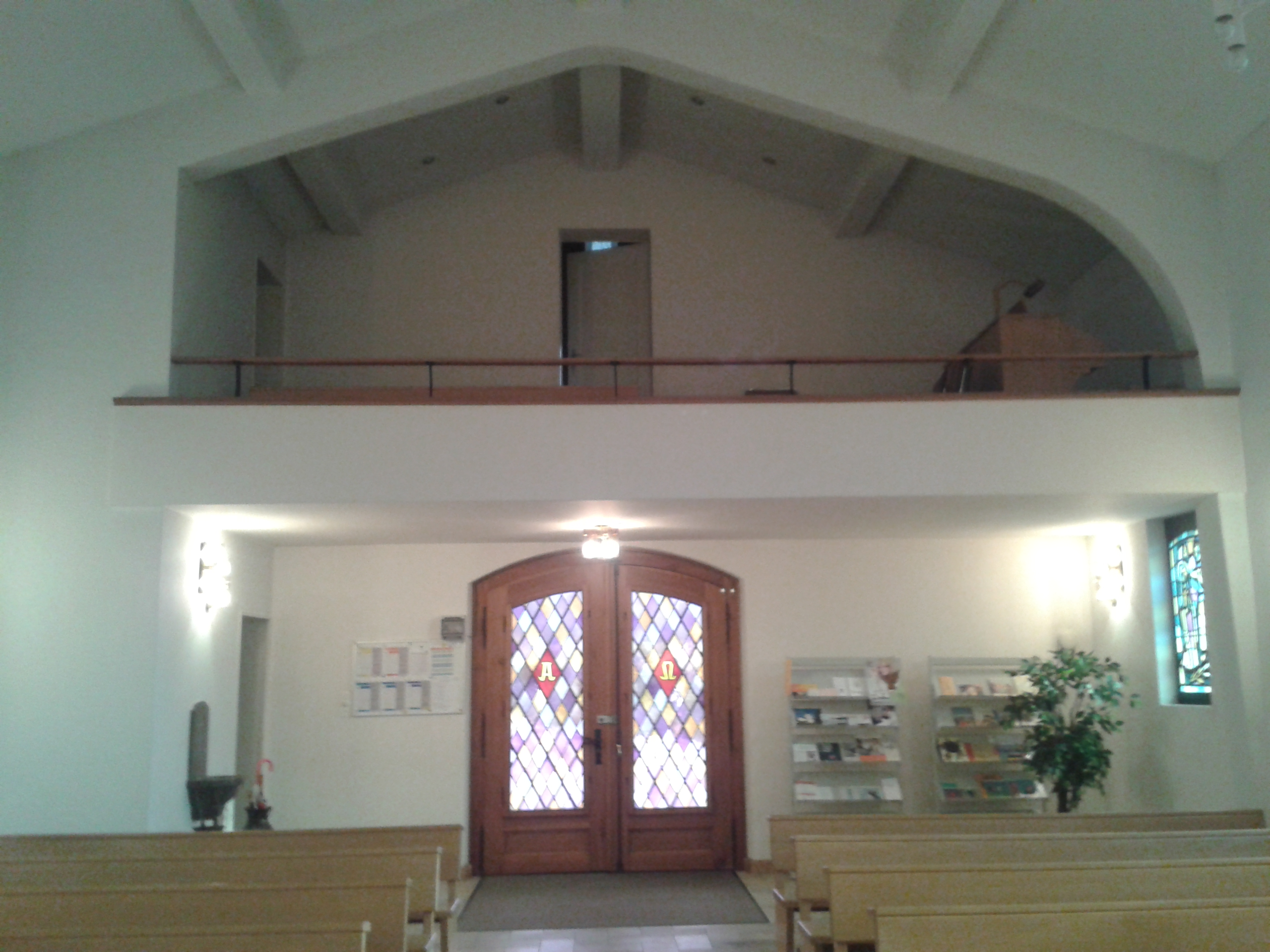 Galerie de l'orgue, porte d'entrée.